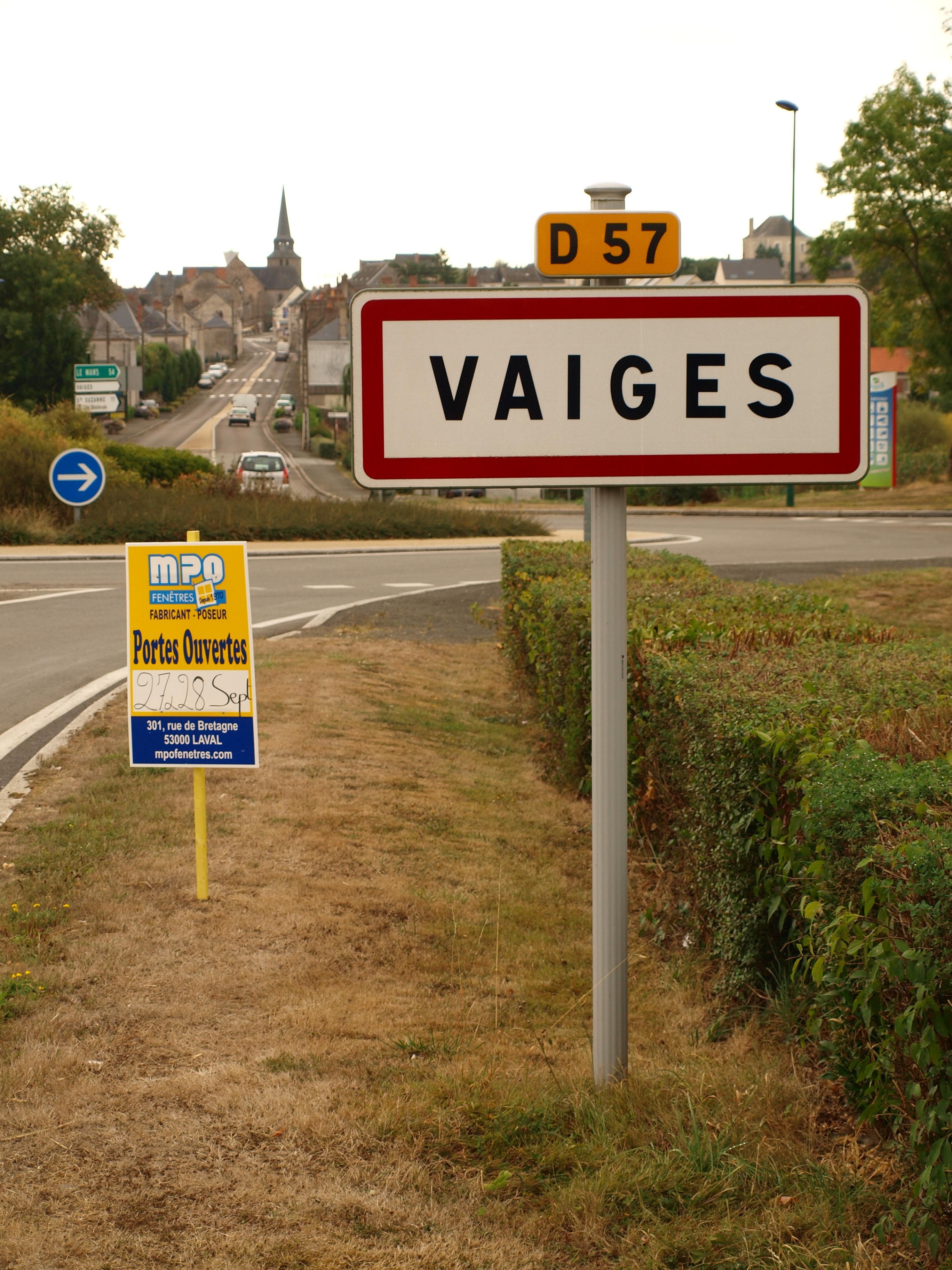 Vaiges (Mayenne, France) ; panneau d'agglomération